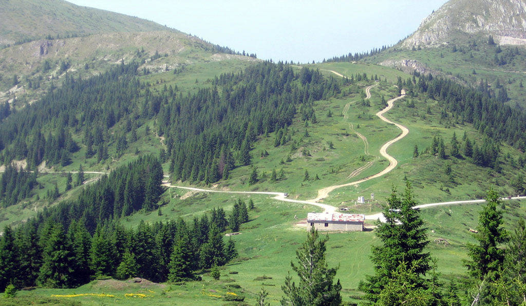 Планина Чакор